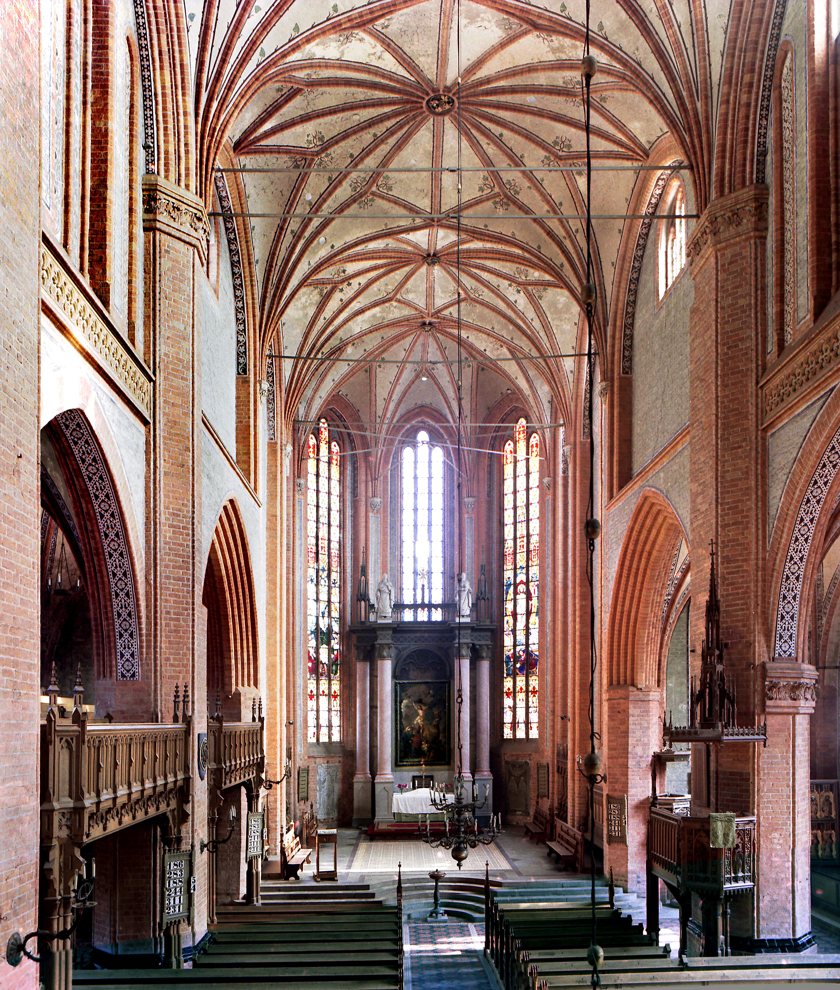 22.09.1987 DDR 2040 [17139] Malchin, Schweriner Straße 5: St. Johanniskirche (GMP: 53.739092,12.761740). Spätgotische Backstein-Basilika, erbaut nach dem Brand von 1397 mit Benutzung älterer Teile, 1440 geweiht. [R19870922A01-A02.JPG]19870922130MNR.JPG(c)Blobelt